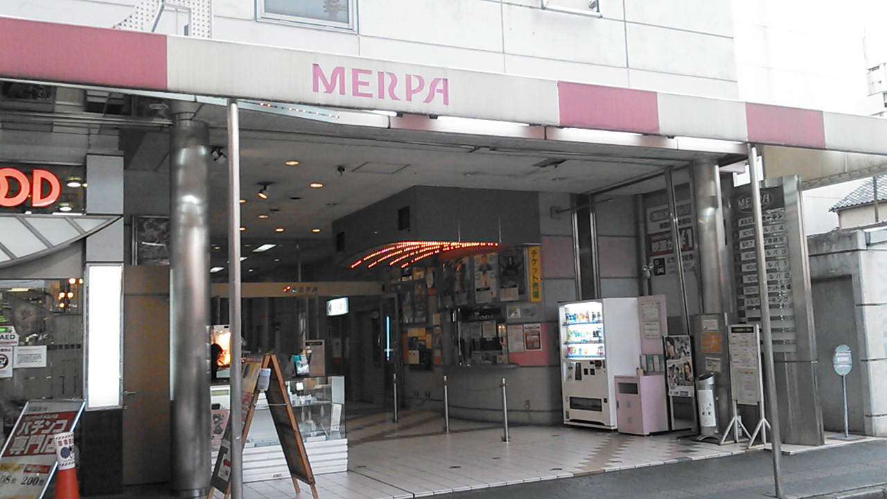 岡山メルパ映画館エントランス。東横イン前より撮影